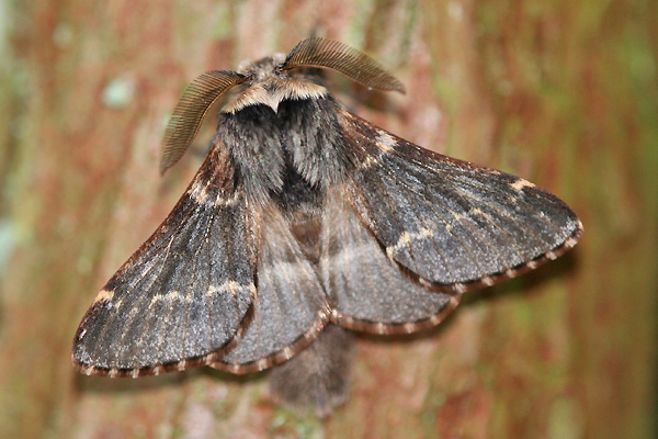 Kleine Pappelglucke (Poecilocampa populi)